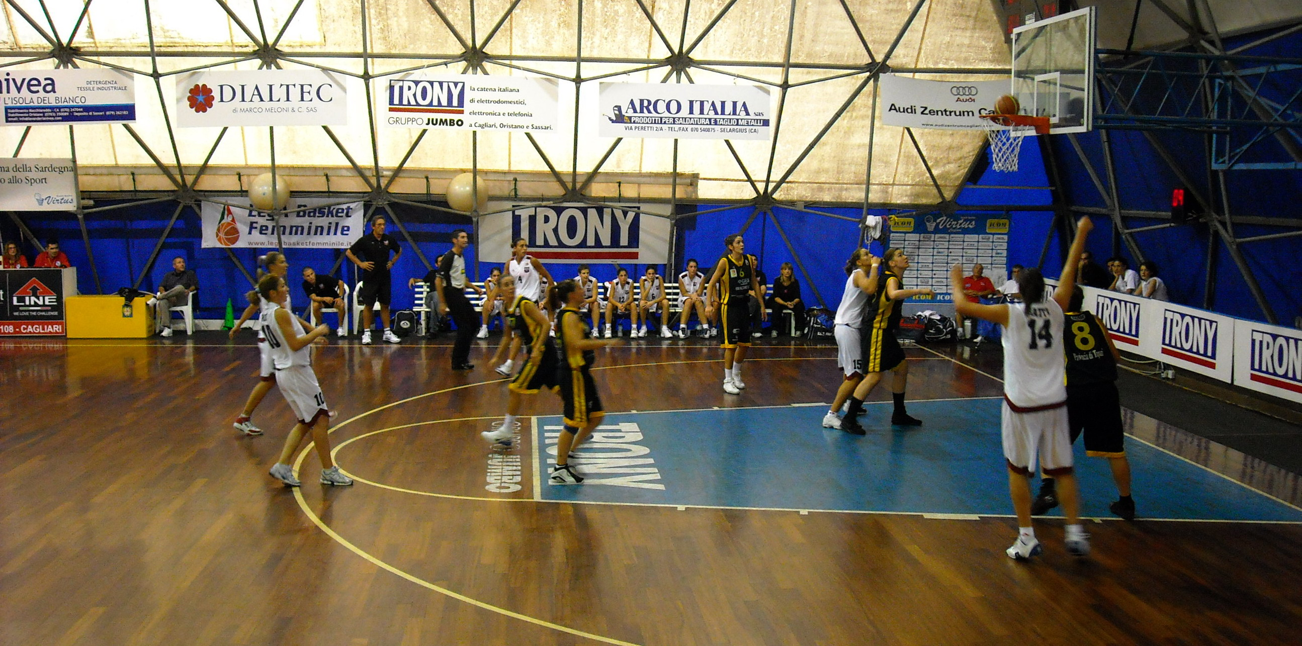 Incontro di pallacanestro femminile tra Basket Alcamo e CUS Cagliari (Coppa Italia)